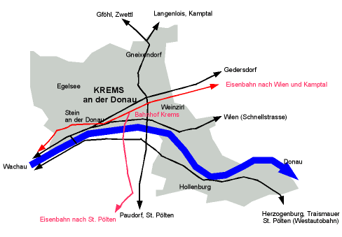 Lageskizze der Stadt Krems a. d. Donau. Selbstgezeichnet, 2003, GNU FDL